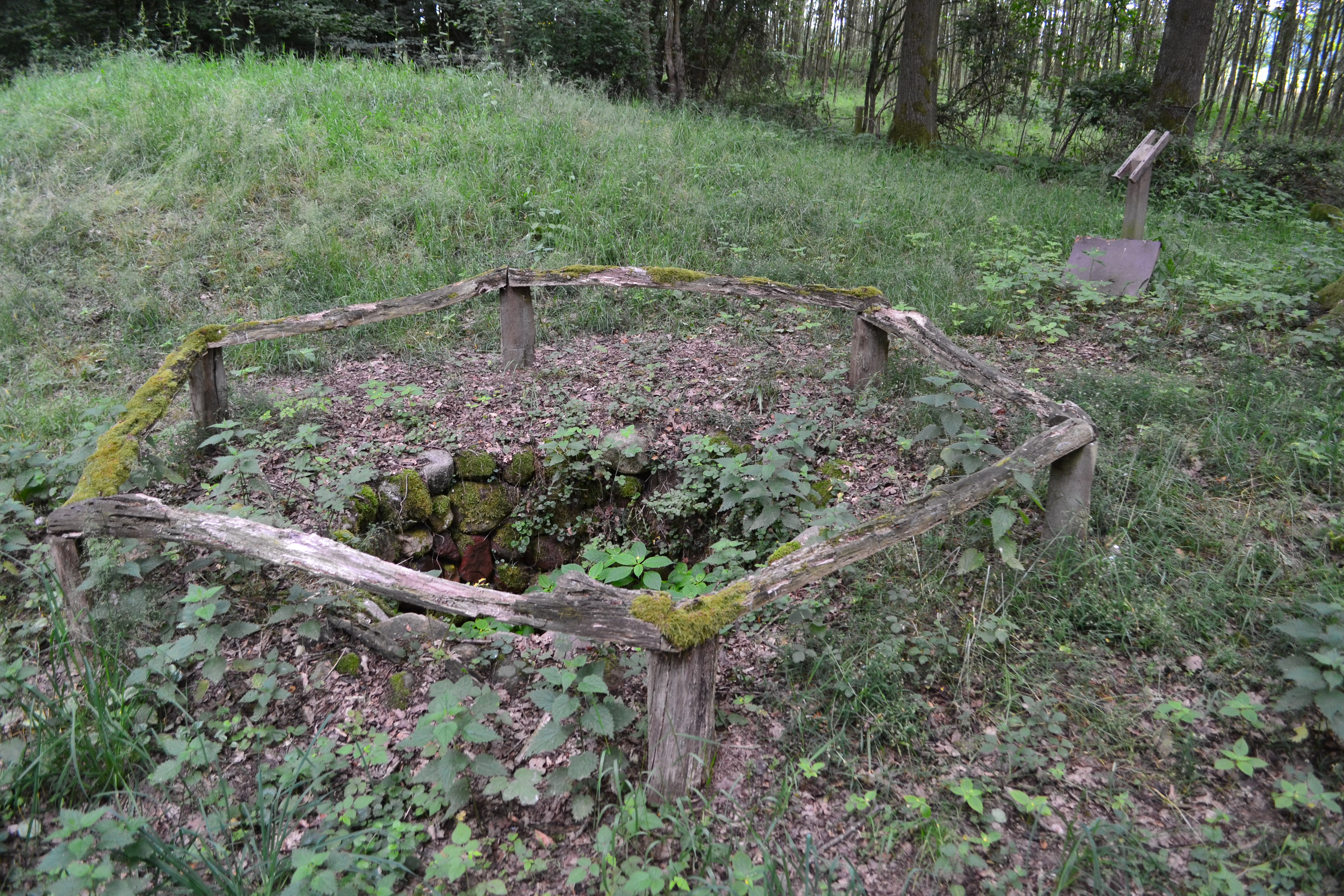 Schachtofen von Gödenstorf